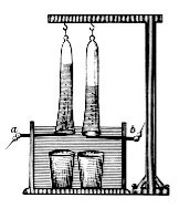 Erste quantitative Wasserelektrolyse durch Johann Wilhelm Ritter, zuerst veröffentlicht in "Voigts Magazin für den neuesten Zustand der Naturkunde", Bd.2 (1800) S.356-400. Die Zeichnung wurde von Ritter selbst angefertigt und illustrierte den Artikel. Die Messbecher fangen das entweichende Gas auf und Ritter bestimmte erstmalig das Verhältnis von Wasserstoffgas (dort: Hydrogen) und Sauerstoffgas richtig mit 2:1.